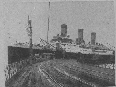 Le paquebot Gallia, transport de troupe coulé le 4 octobre 1916.